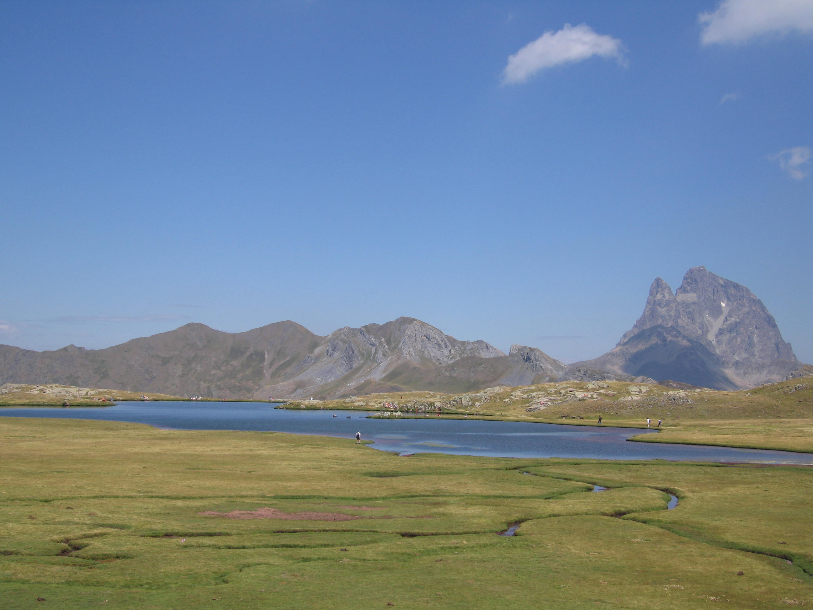 Aragonés: Turberas d'Anayet